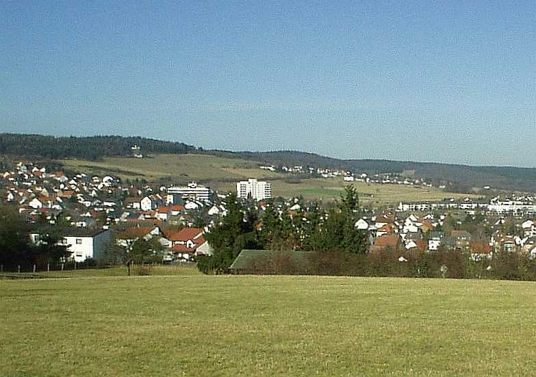 Neu Anspach v. Südosten